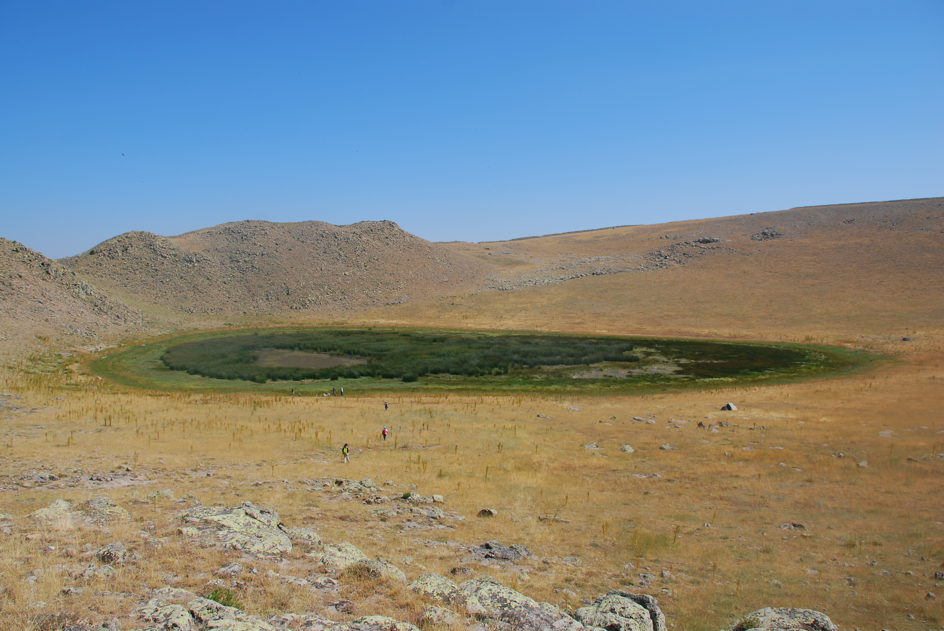 Göllüdağ Krater Gölü, Niğde